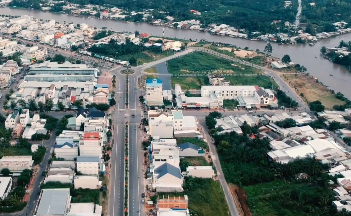 Thị trấn Phong Điền